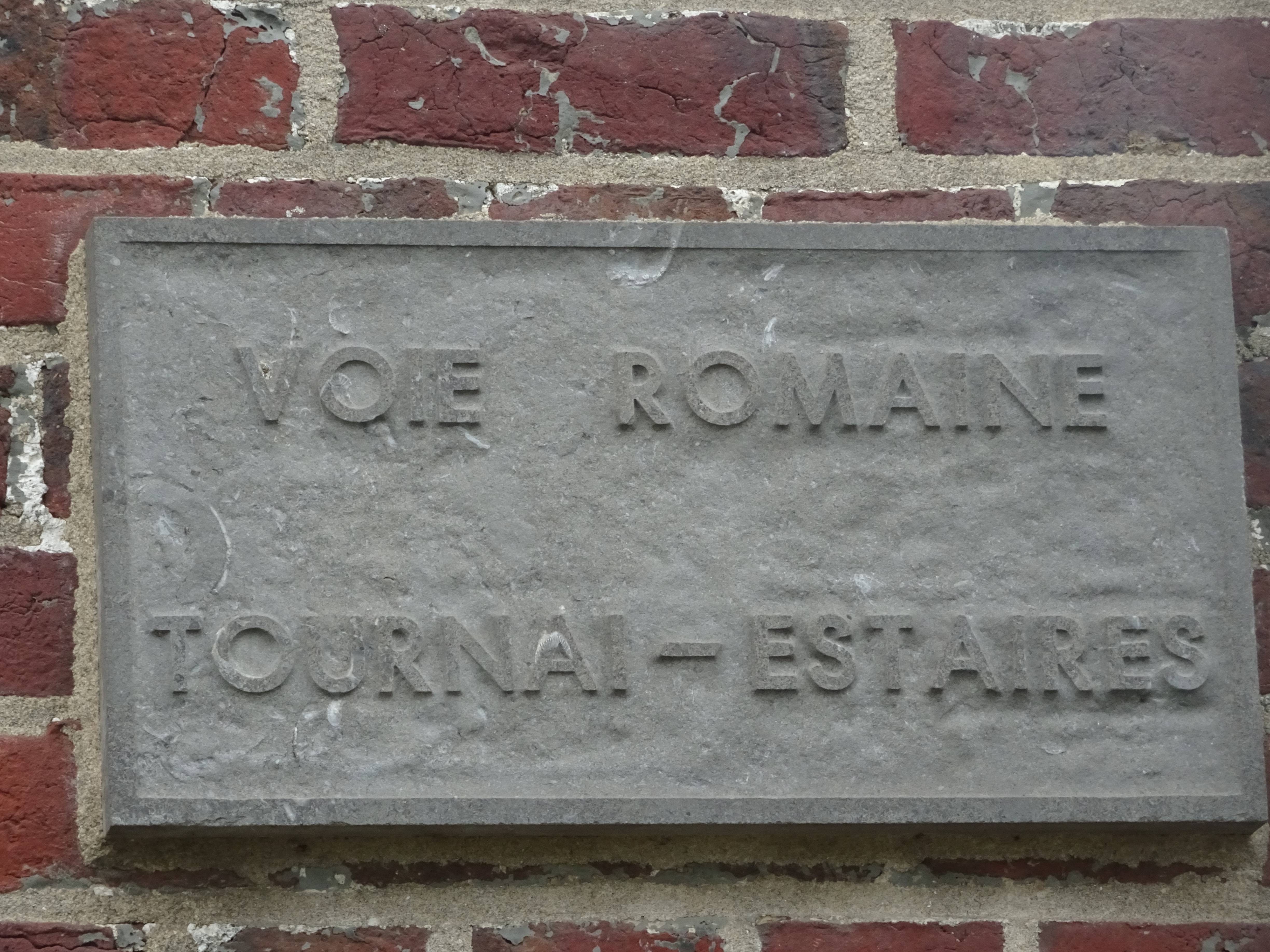 Plaque signalant la "Voie romaine Tournai-Estaires" sur les pavés rue de la Justice du Paris-Roubaix - Camphin-en-Pévèle Nord Hauts-de-France.